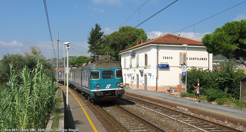 Stazione ferroviaria di Cervo-San Bartolomeo. In sosta un treno di elettromotrici ALe 801/940 e rimorchiate.